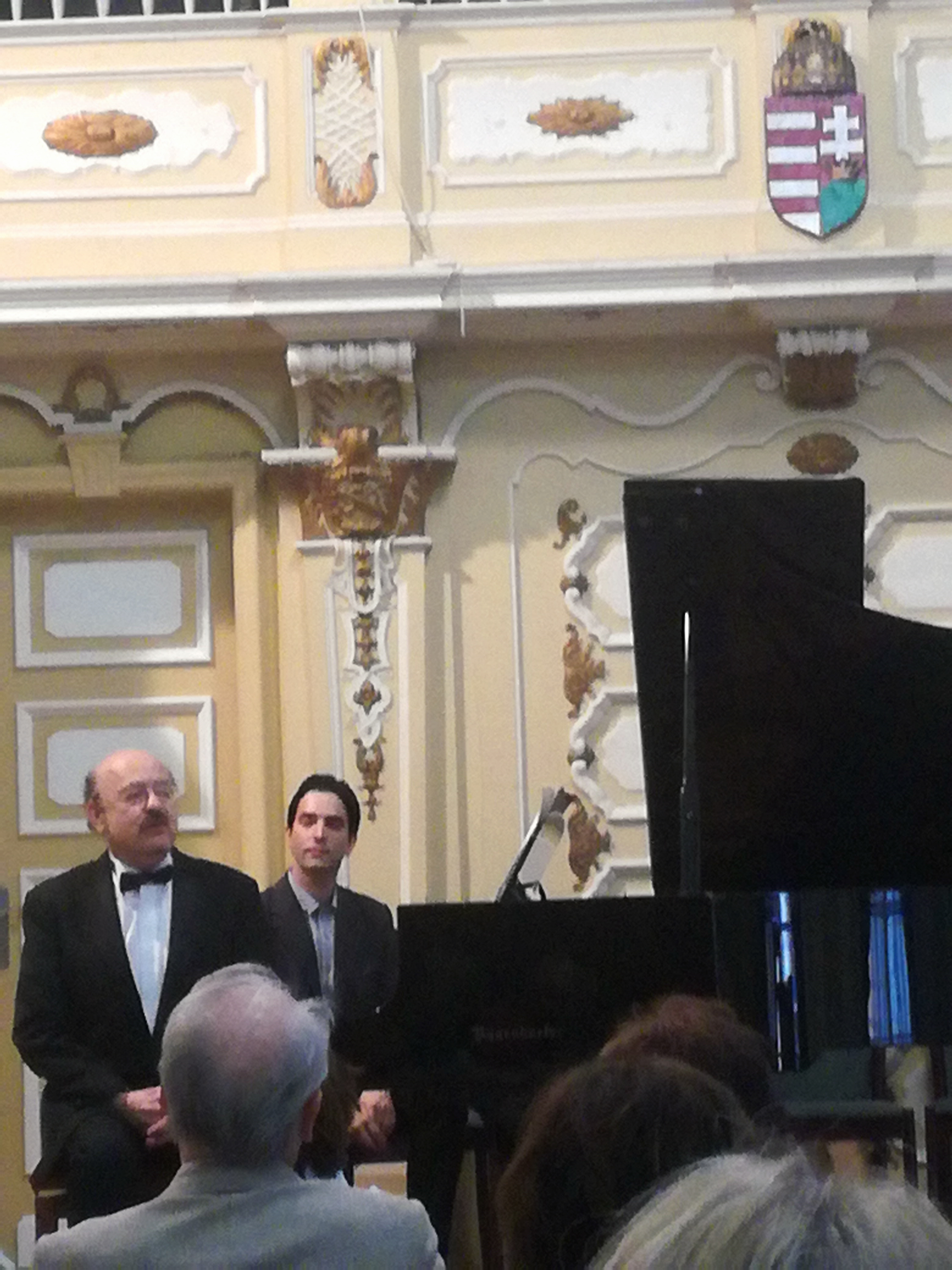 Fenyő Gusztáv koncertje a miskolci Zenepalotában (a háttérben Flach Antal csembalóművész, a miskolci BACH-hét alapítója)